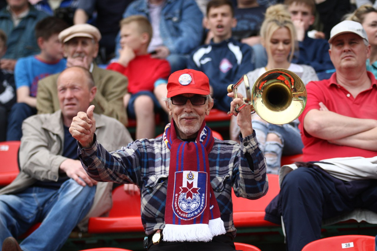 Трубач Виктор Паутов на стадионе Старт.